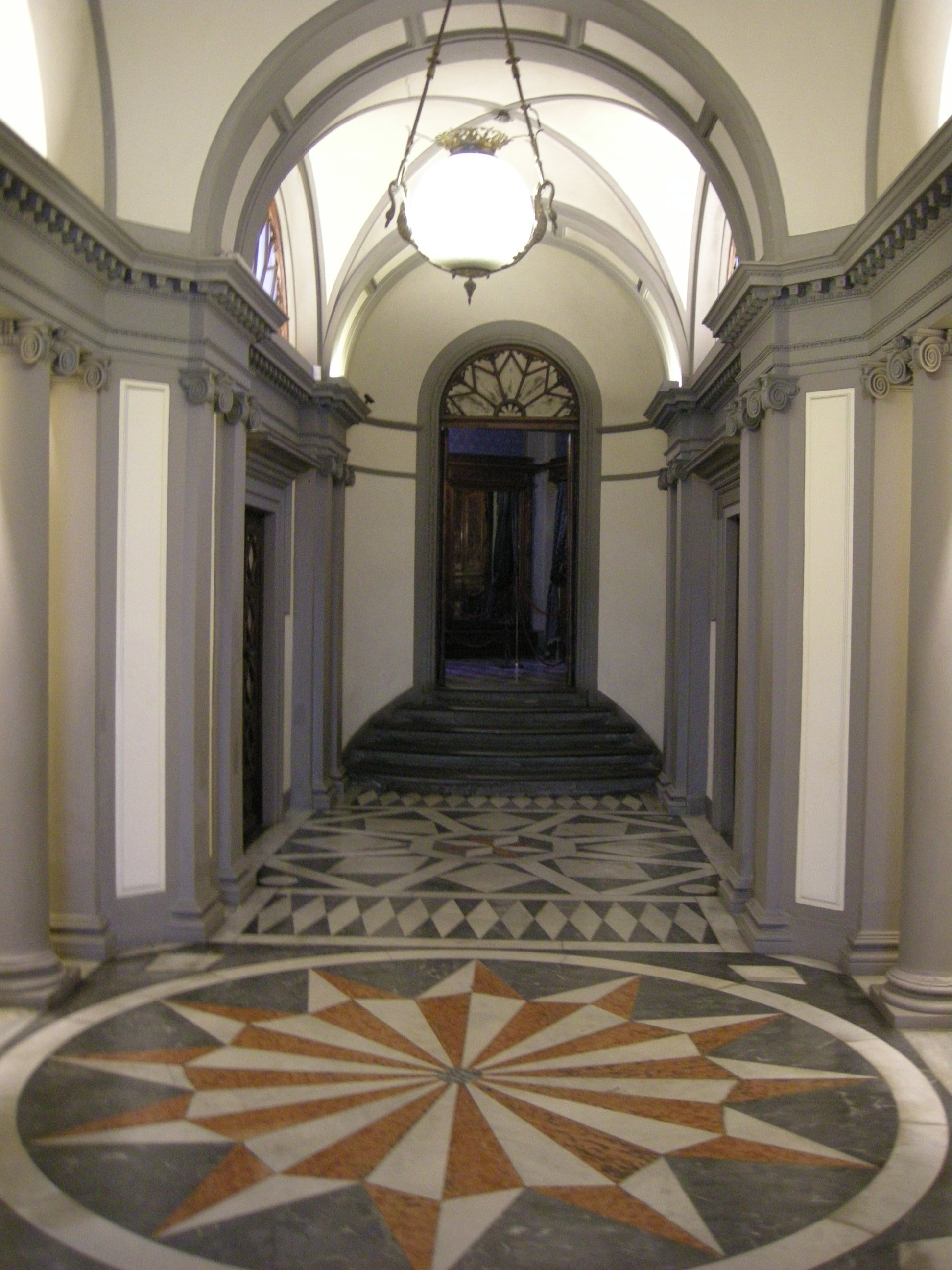 Farmacia di smn, vestibolo